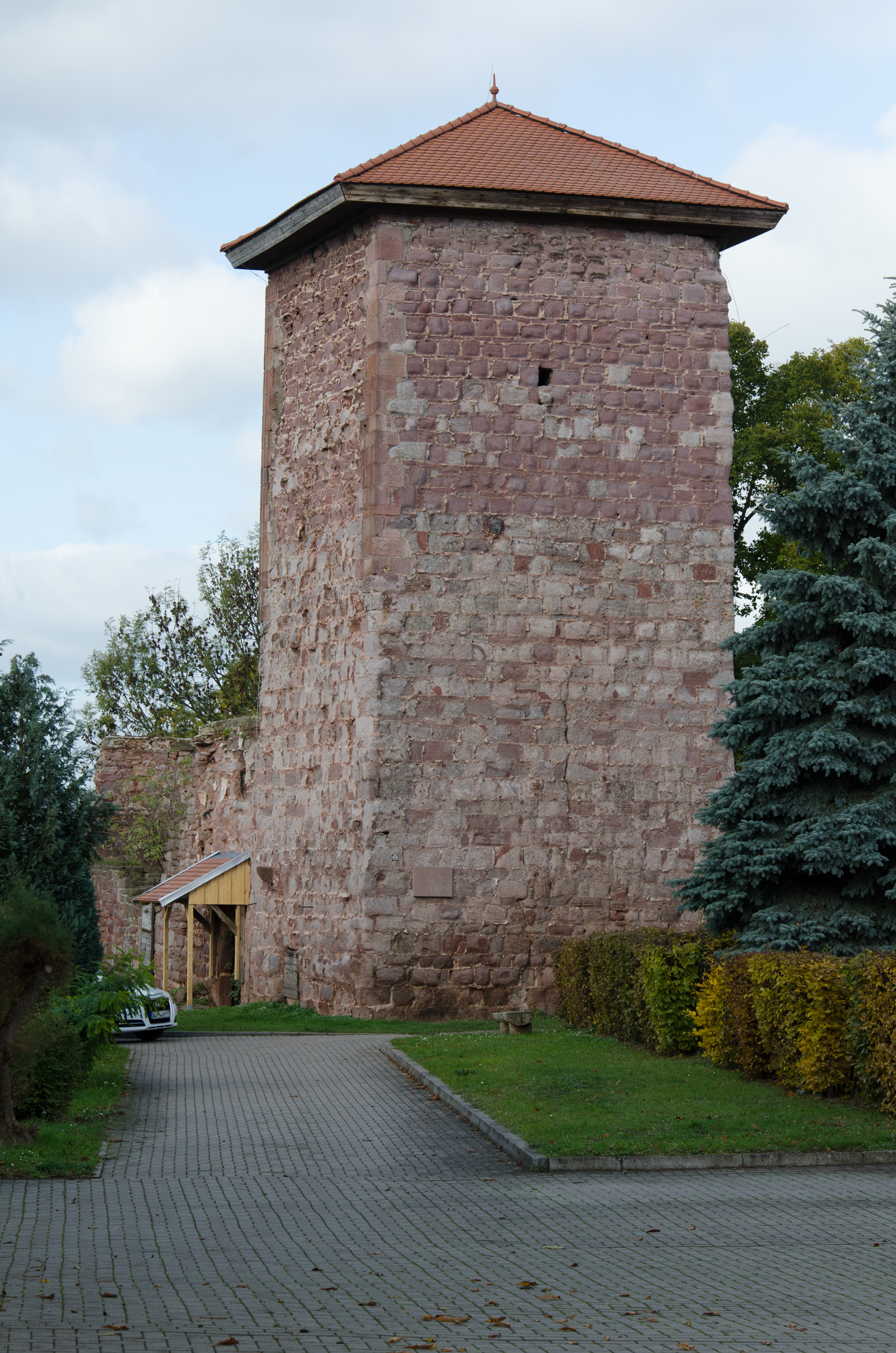 Kelbra, Burg